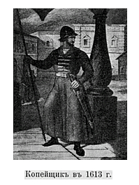 Эта фотография была использована для иллюстрирования статьи «Копейщики» опубликованной в тринадцатом томе «Военной энциклопедии», который был издан книгоиздательским товариществом И. Д. Сытина в 1913 году в столице Российской империи городе Санкт-Петербурге. Более подробное описание к этой картинке можно прочесть в указанной выше статье.